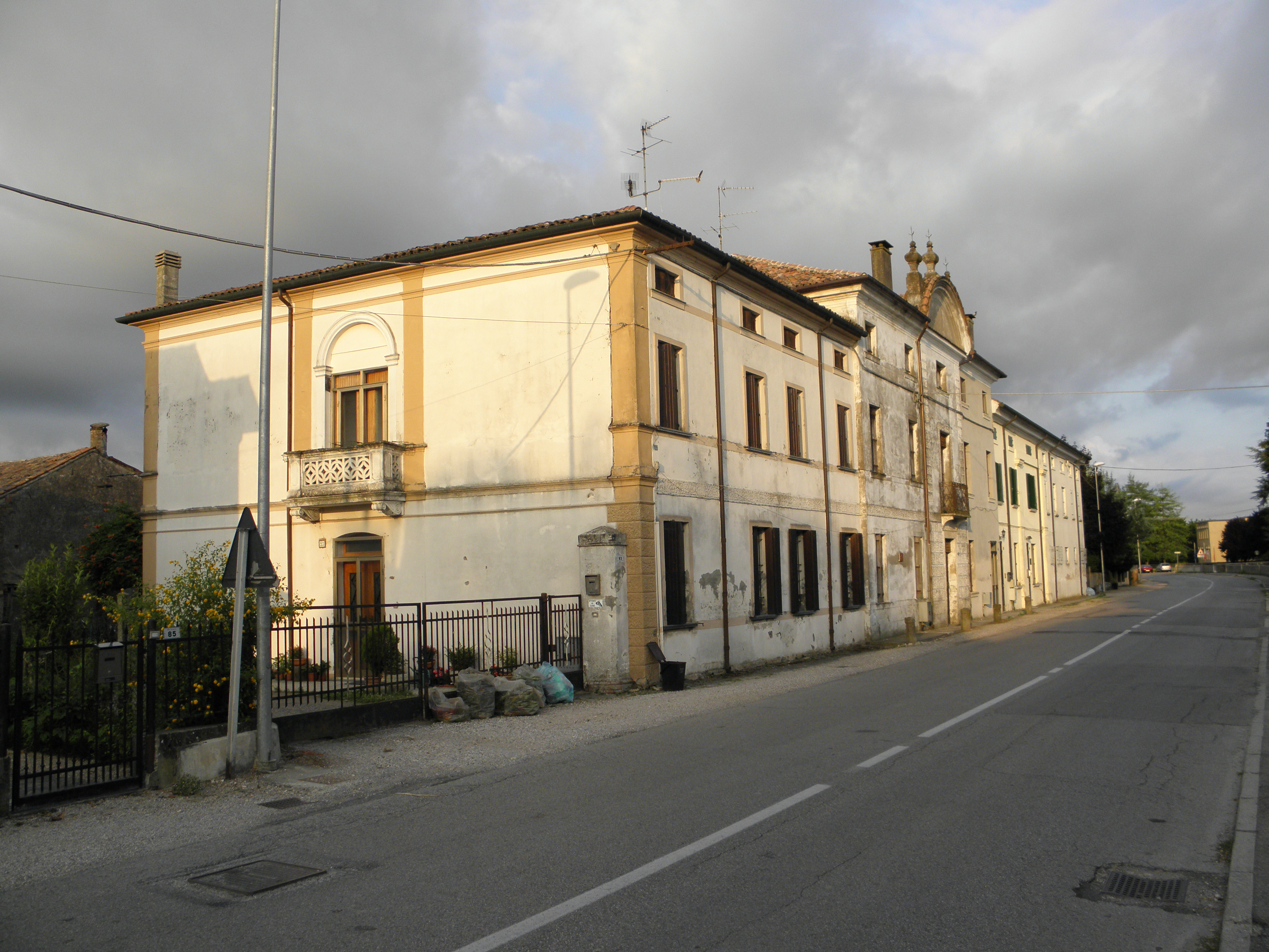 Fiesso Umbertiano: Villa Migliorini